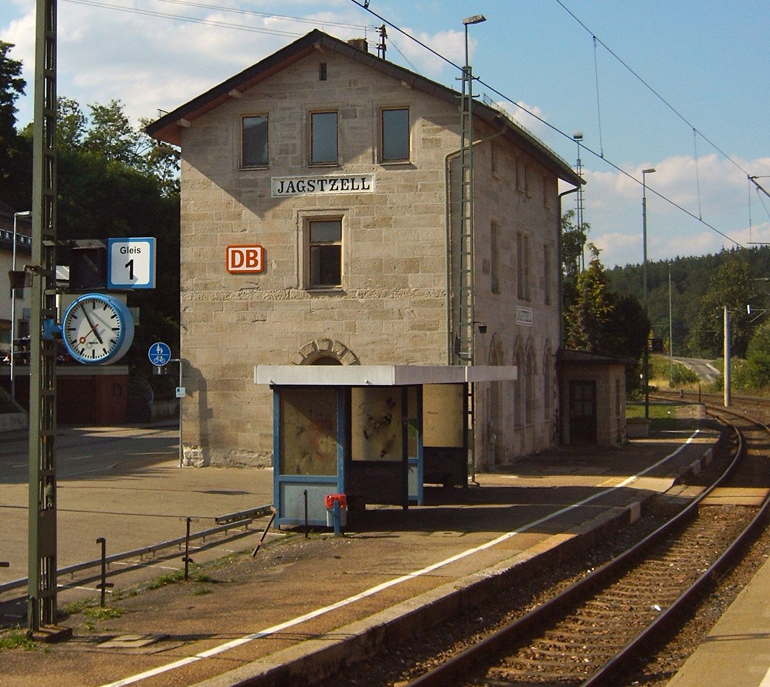 Bahnhof Jagstzell, Obere Jagstbahn